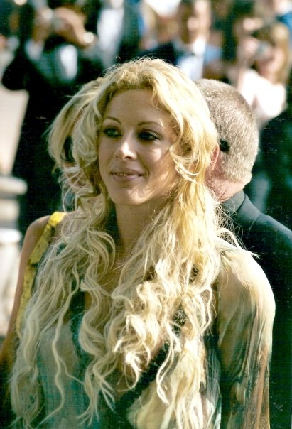 Loana au festival de Cannes